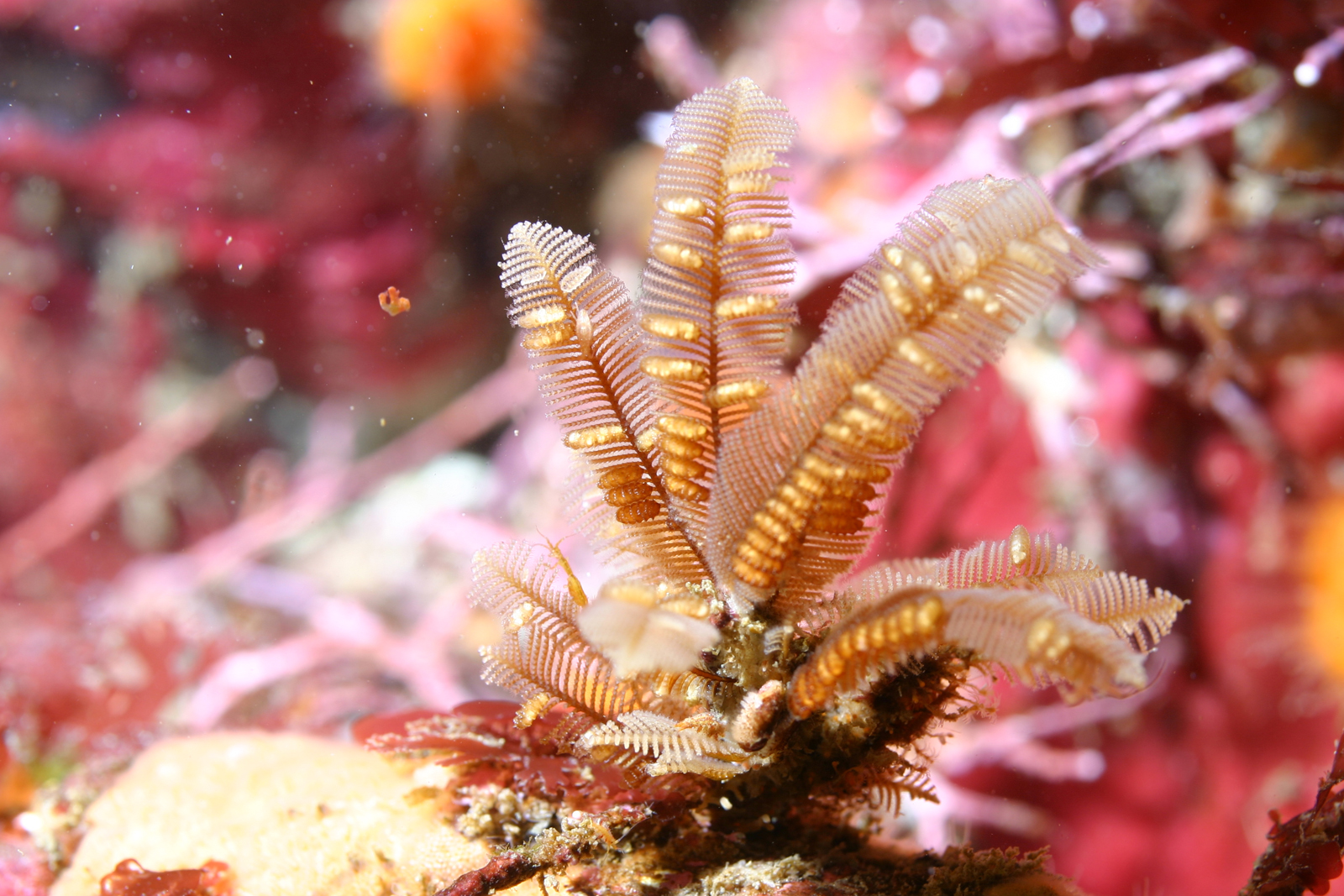 Hidrocoral Aglaophenia struthionides en Pebble Beach, EE.UU.